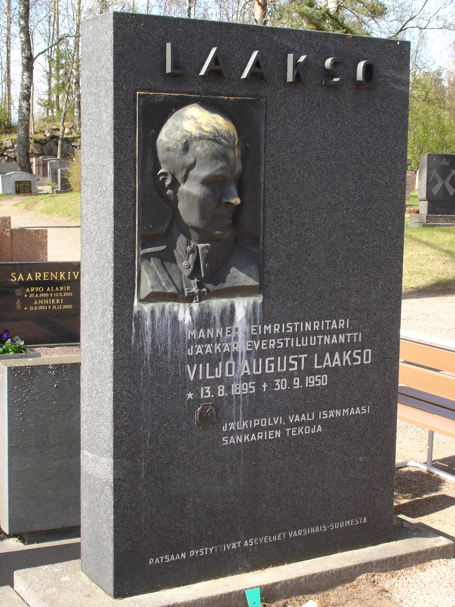 Mannerheimristinritari Viljo Aukusti Laakso 1985.1950